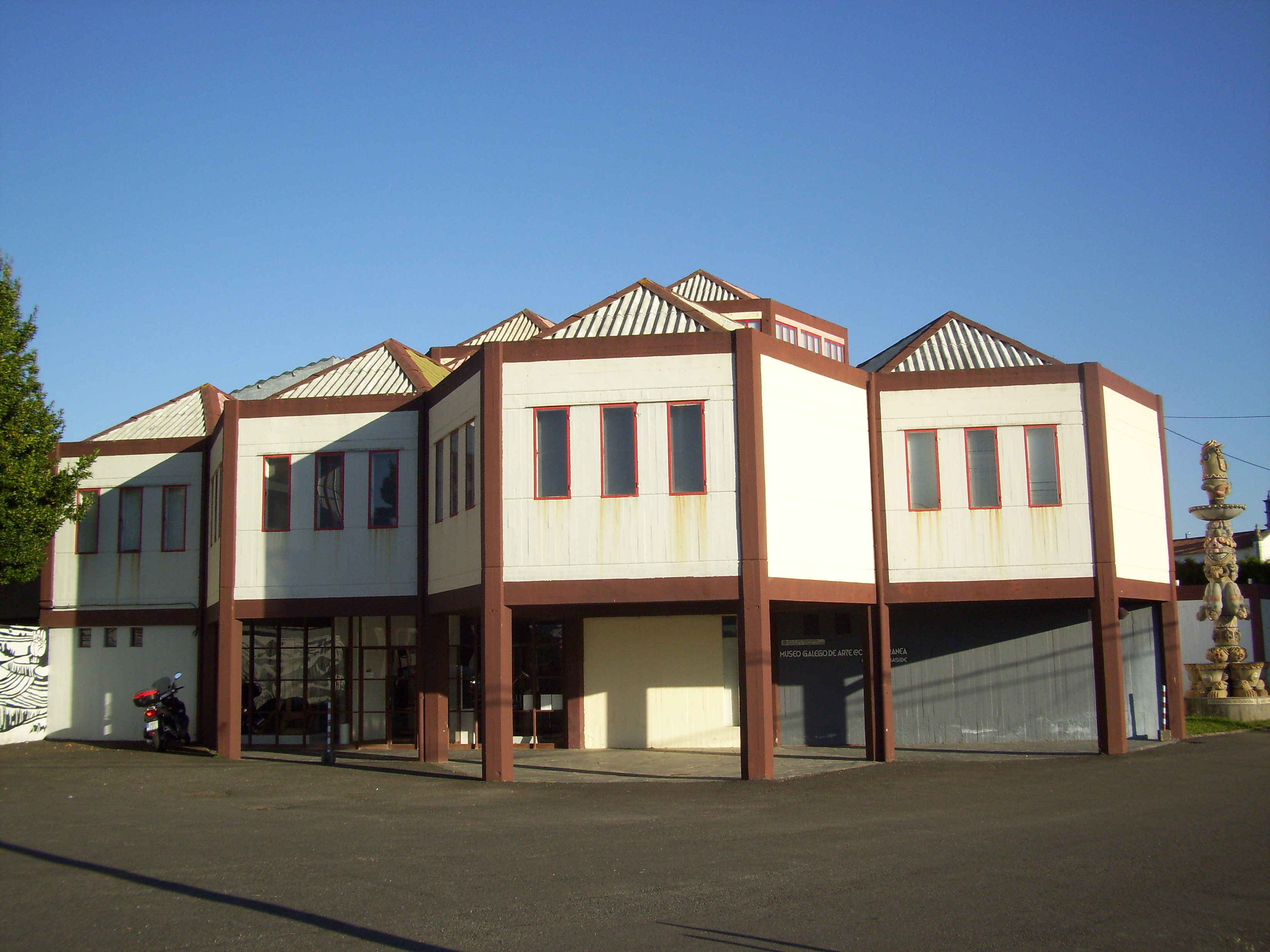 Imaxe frontal do Museo Galego de Arte Contemporánea Carlos Maside, no Castro de Samoedo (Sada, A Coruña). Este museo está no complexo da fábrica de Cerámicas do Castro, do Grupo Sargadelos.